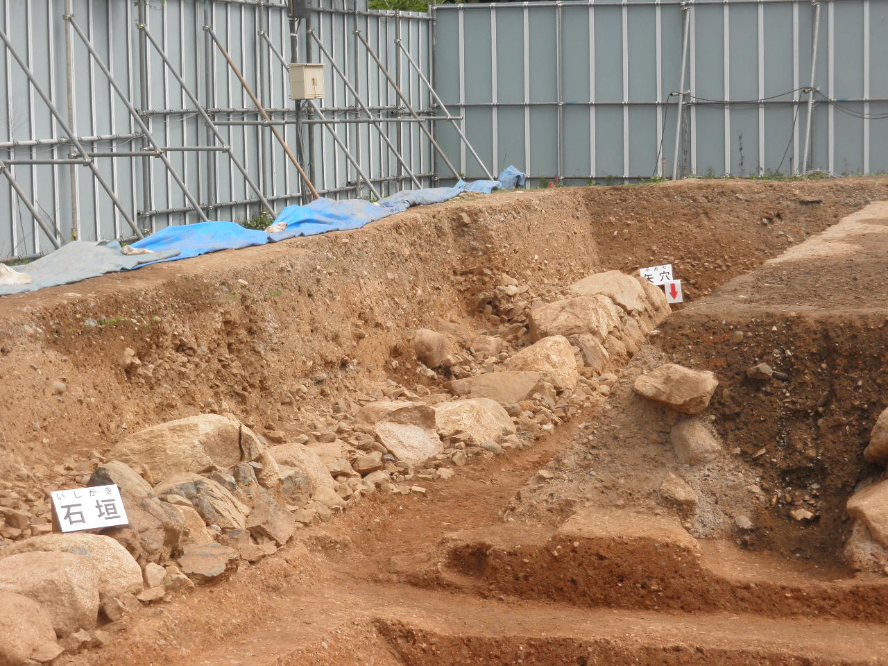 伏見指月城の石垣など